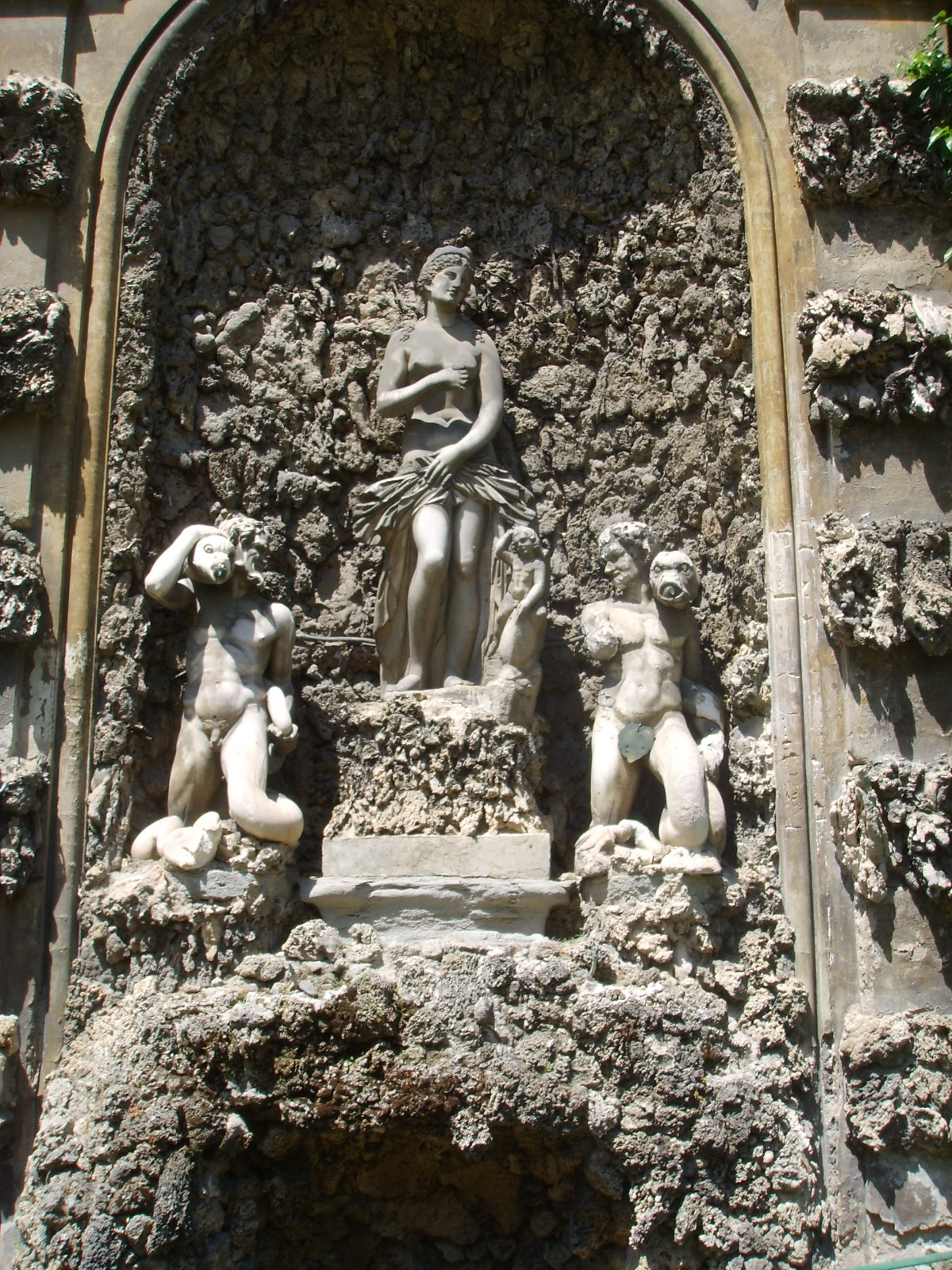 Palazzo Budini Gattai di Firenze; fontana del giardino. Le statue di Afrodite nascente dalle acque e dei Tritoni ai suoi lati sono di Giovanni Bandini.